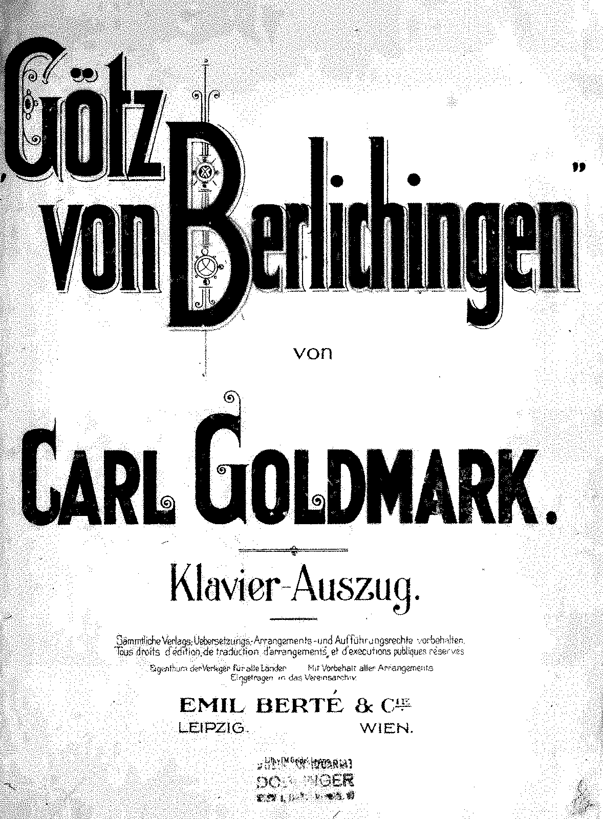 A Götz von Berlichingen első kiadása.